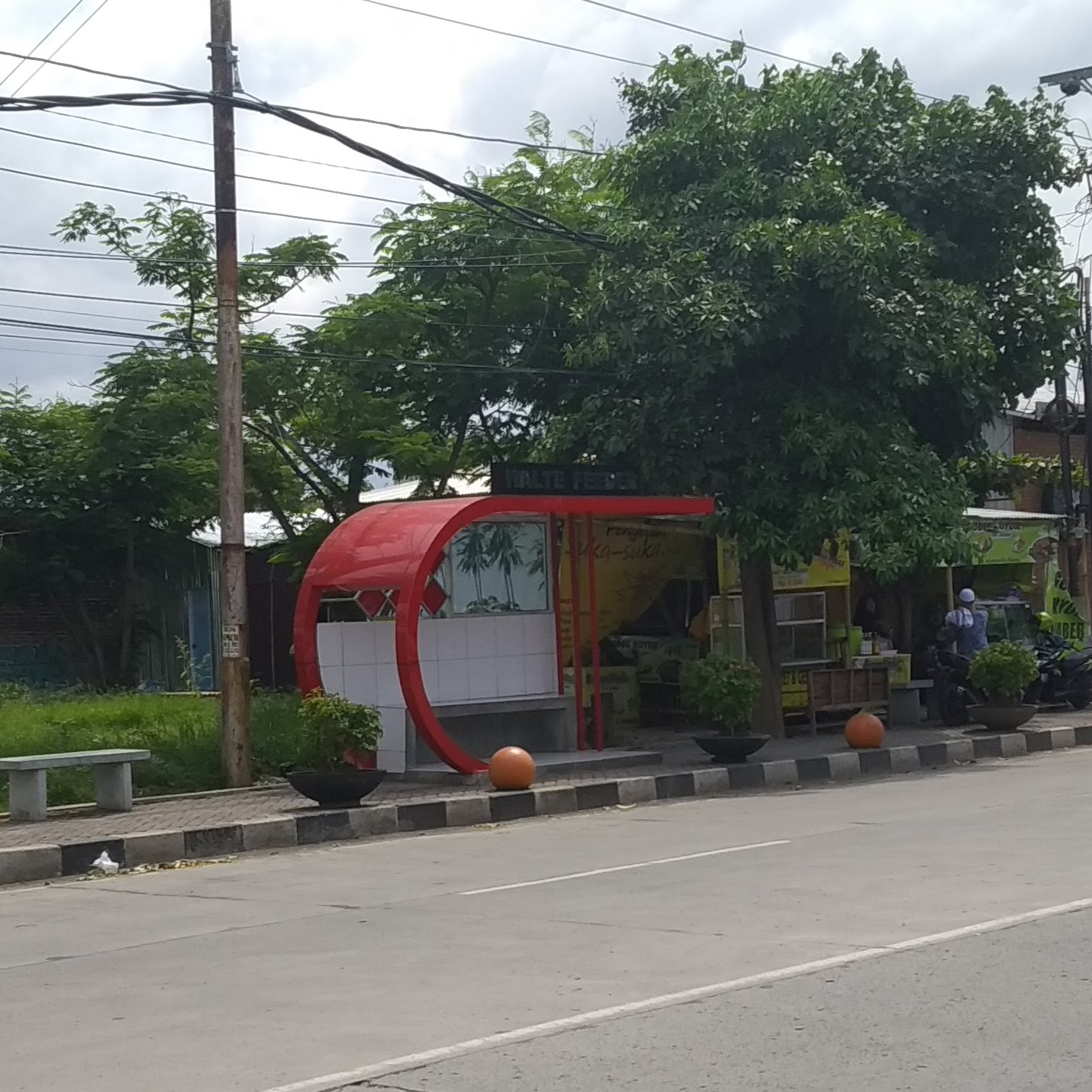 Halte Feeder yang berada di Jolotundo, dekat Masjid Agung Jawa Tengah (MAJT). Gambar dipotong dengan aspek rasio 1:1 untuk mengurangi objek yang tidak diperlukan. Terlihat bahwa halte berada pada posisi lebih rendah dari halte BRT